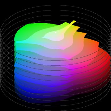 Synthetische afbeelding van de RGB-kleurenruimte op subjectieve verzadiging, intensiteit en tint. Bron: eigen C++-programma gevolgd door GIMP voor omzetting naar jpg; Auteursrechten: vrij (LGPL).